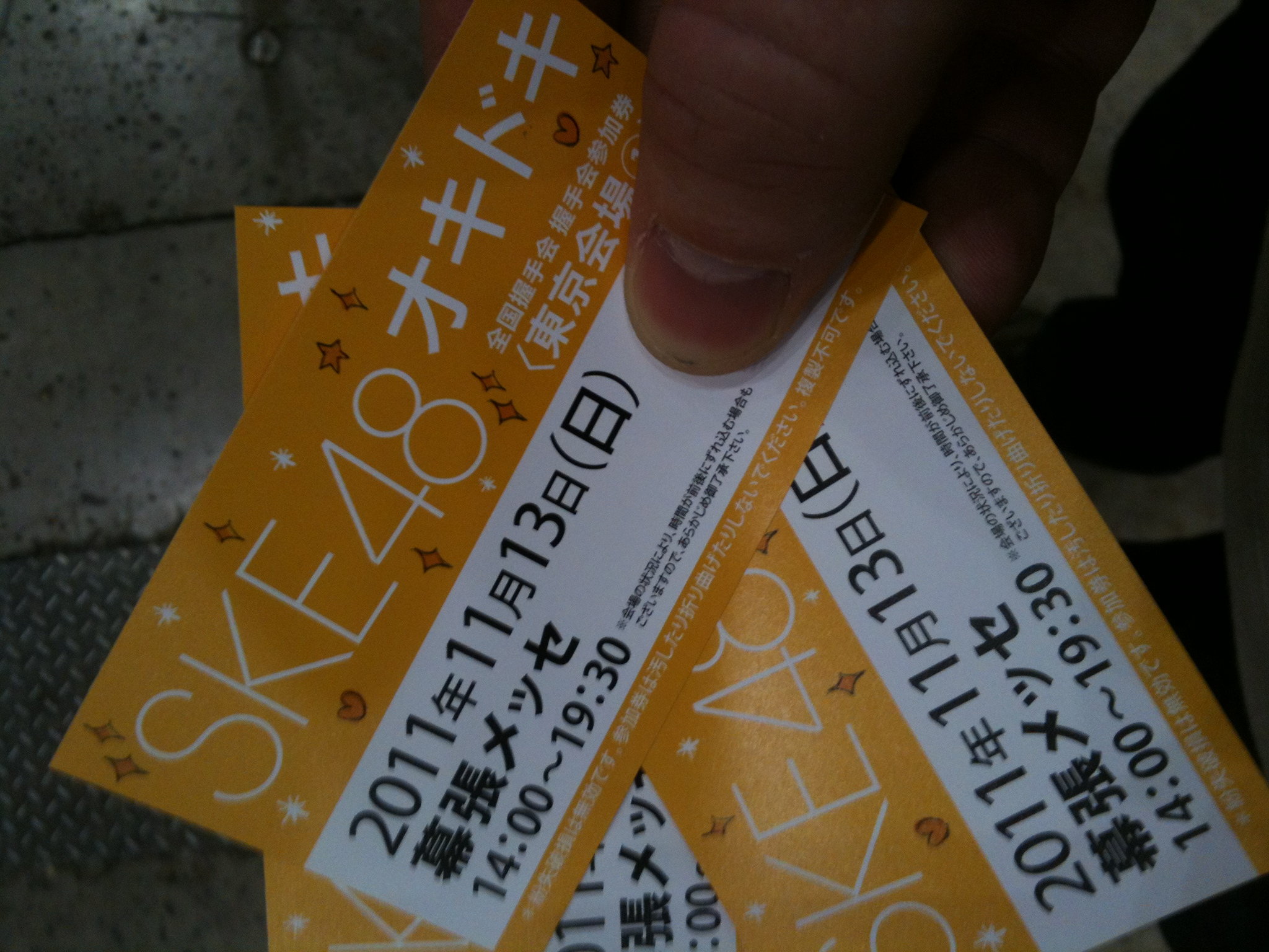 SKE48 シングルCD「オキドキ」特典の握手会参加券（2011年11月13日、千葉県千葉市・幕張メッセ 全国握手会）。